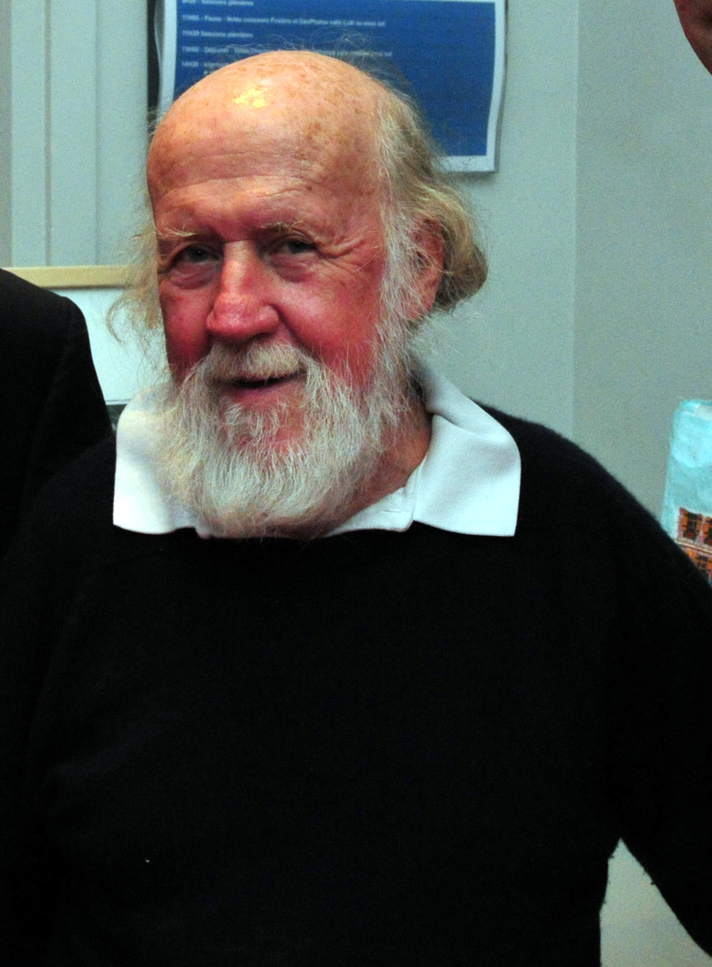 Photo d'Hubert Reeves prise le 1er octobre 2008